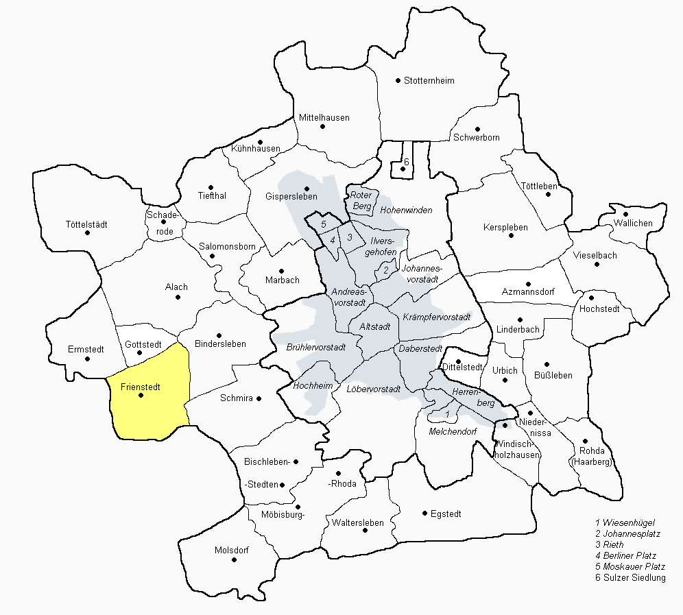 Stadtteilkarte von Erfurt, Frienstedt hervorgehoben